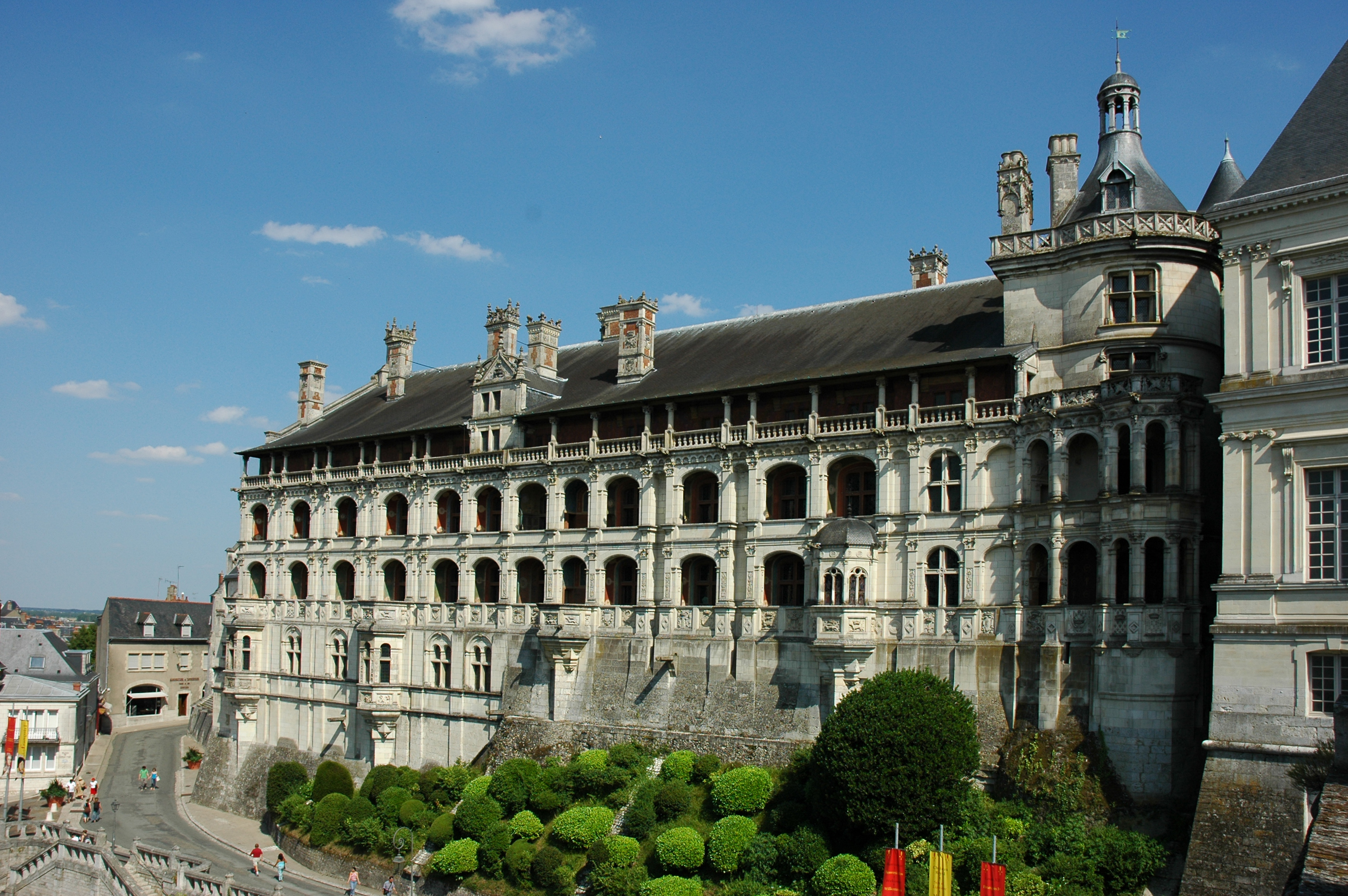 France Loir-et-Cher Blois Château Aile François 1er Façade des loges Photographie prise par Patrick GIRAUD